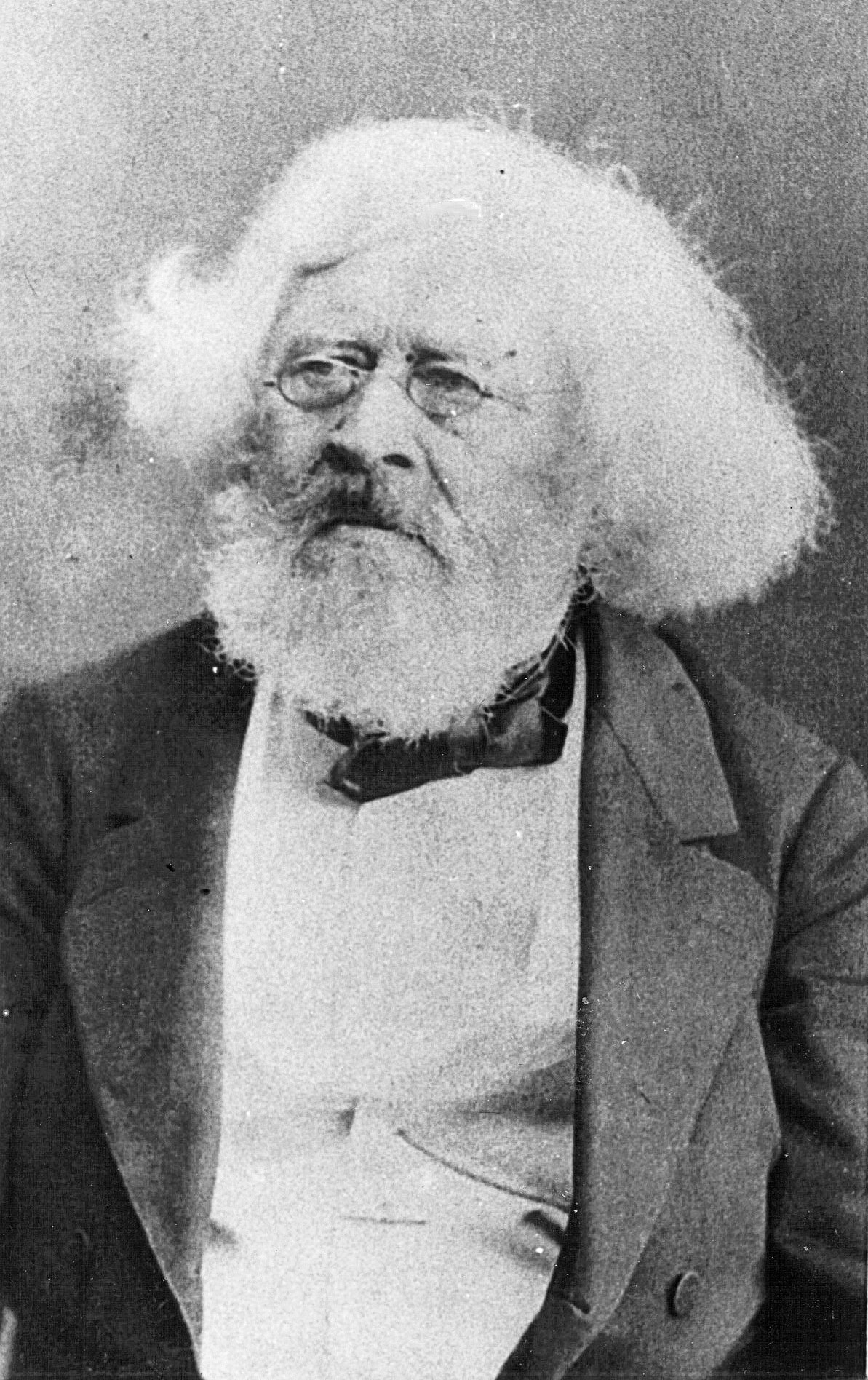 Originalfoto Peter Andreas Hansen (1795–1874) in den letzten Lebensjahren